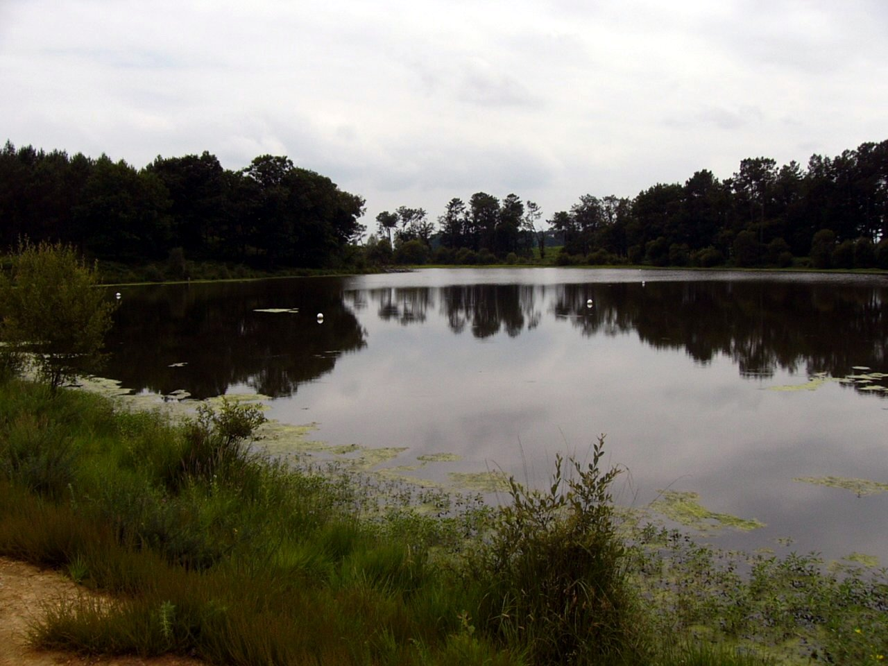 Lac d'Agès